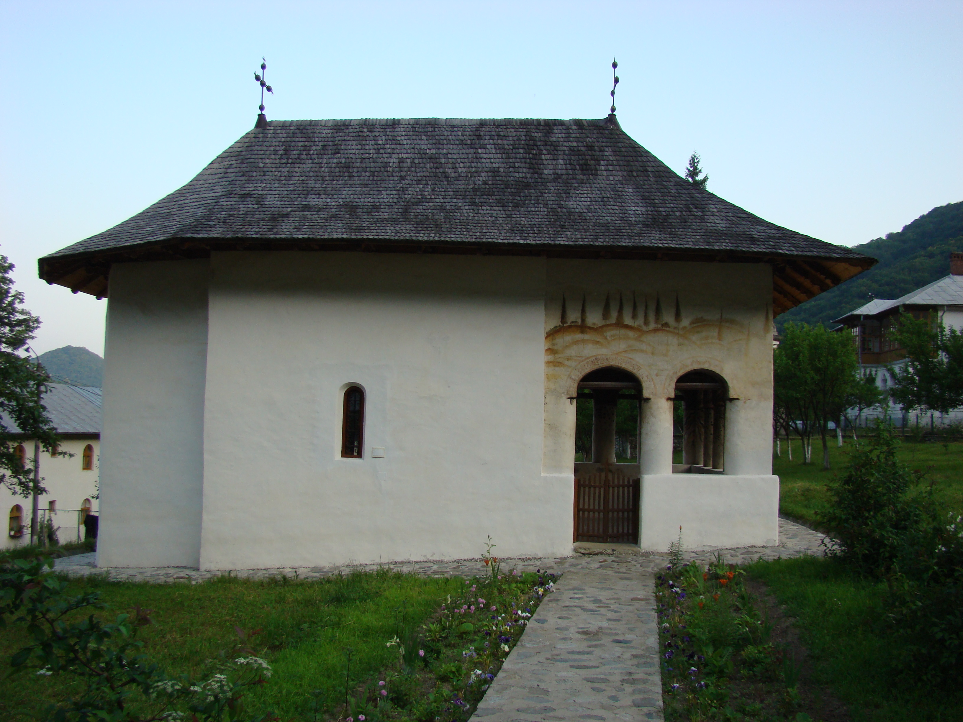 Mănăstirea Bistrița, județul Vâlcea 02